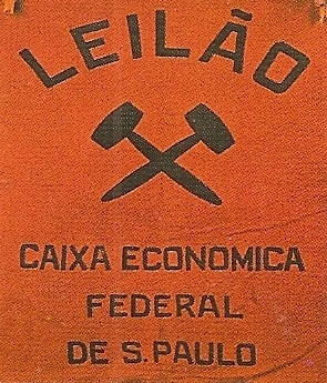 Estandarte de leilão da Caixa Econômica Federal de São Paulo. Década de 30.